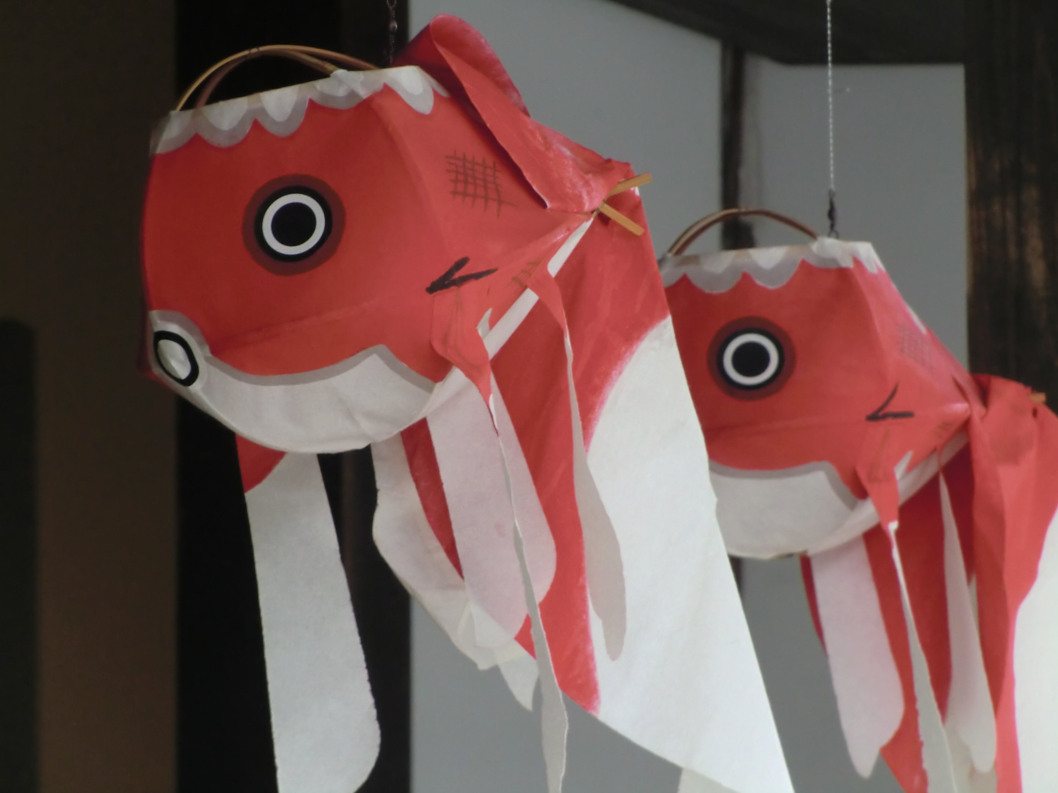 軒下に吊り下げられた柳井市名物の金魚ちょうちん。